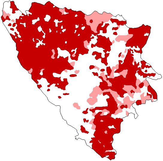 Православни хришћани у БиХ, према попису из 1921. године. 50-100% 30-50% 0-30%